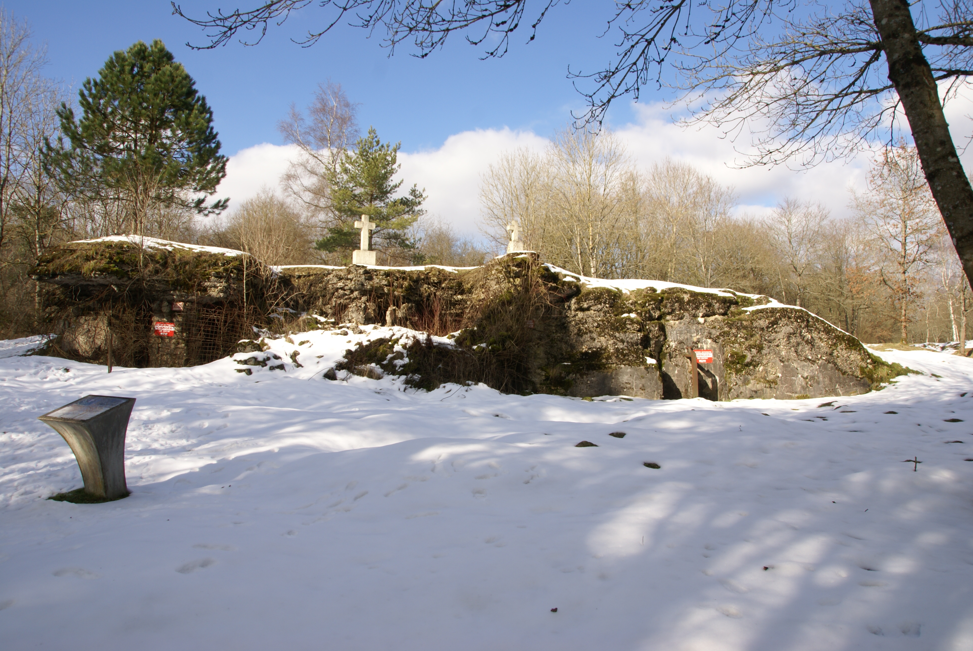 Abri d'infanterie FT3 (Froideterre-Thiaumont), près de Verdun.